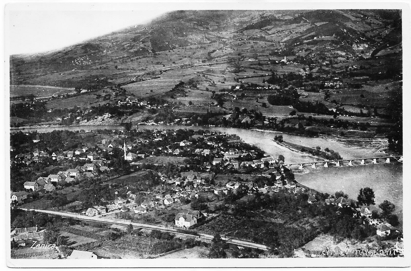 ЗЕНИЦА - ЈУЖНИ ДИО ЗЕНИЦЕ, 1935. Г. Зеница је била град с двије чаршије. Једна свима позната и једну која је нестала у току урбанизације. Друга чаршија, која је наравно имала све неопходне садржаје, била је на „граници” насеља (махала) Одмут и Сејмен, уз Дрвену ћуприју (Дрвени мост). Све је у тој чаршији било: кафане, меснице, пиљаре, пекаре (Бекрића и Мустафе Рамића), бријачнице (Фрндића, државна задруга), трговине робоим широке потрошње, сластичарне (Бегагић), столарије (Екиновић), обућари, трафике... Та је чаршија почела нестајати почетком ’60-их година, а коначно је нестала изградњом Обалног булевара и новог металног моста, који се зове Дрвени мост, што се десилои 1972. године. На фотографији се виде зграде и друге зеничке чаршије, уз лијеву обалу Босне, која је почињала од Дрвене ћуприје, па до пола пута према Сејменској џамији. Сликано је с Крча и Тудра, стијена изнад Крча (југ Крча). Тешко је рећи гдје је Брод, садашња Зеница првонастала, да ли ту гдје се Босна бродила (прелазила), да ли у насељу Меокушнице, гдје је давно постојао трг (насеље трговачког типа), или пак у садашњој чаршији?! Нема писаних докумената о аутору дјела.